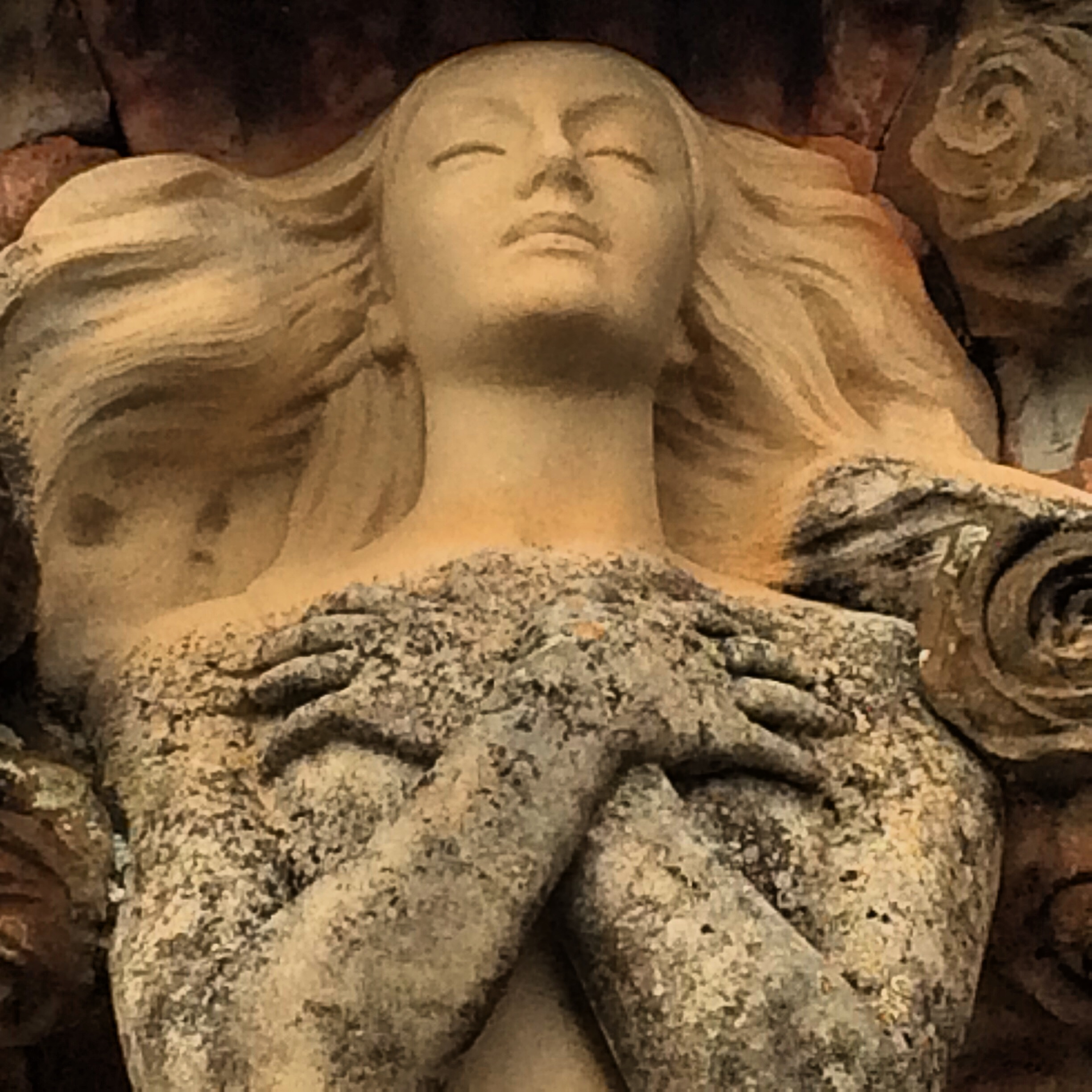 Cementiri Municipal (Lloret de Mar)